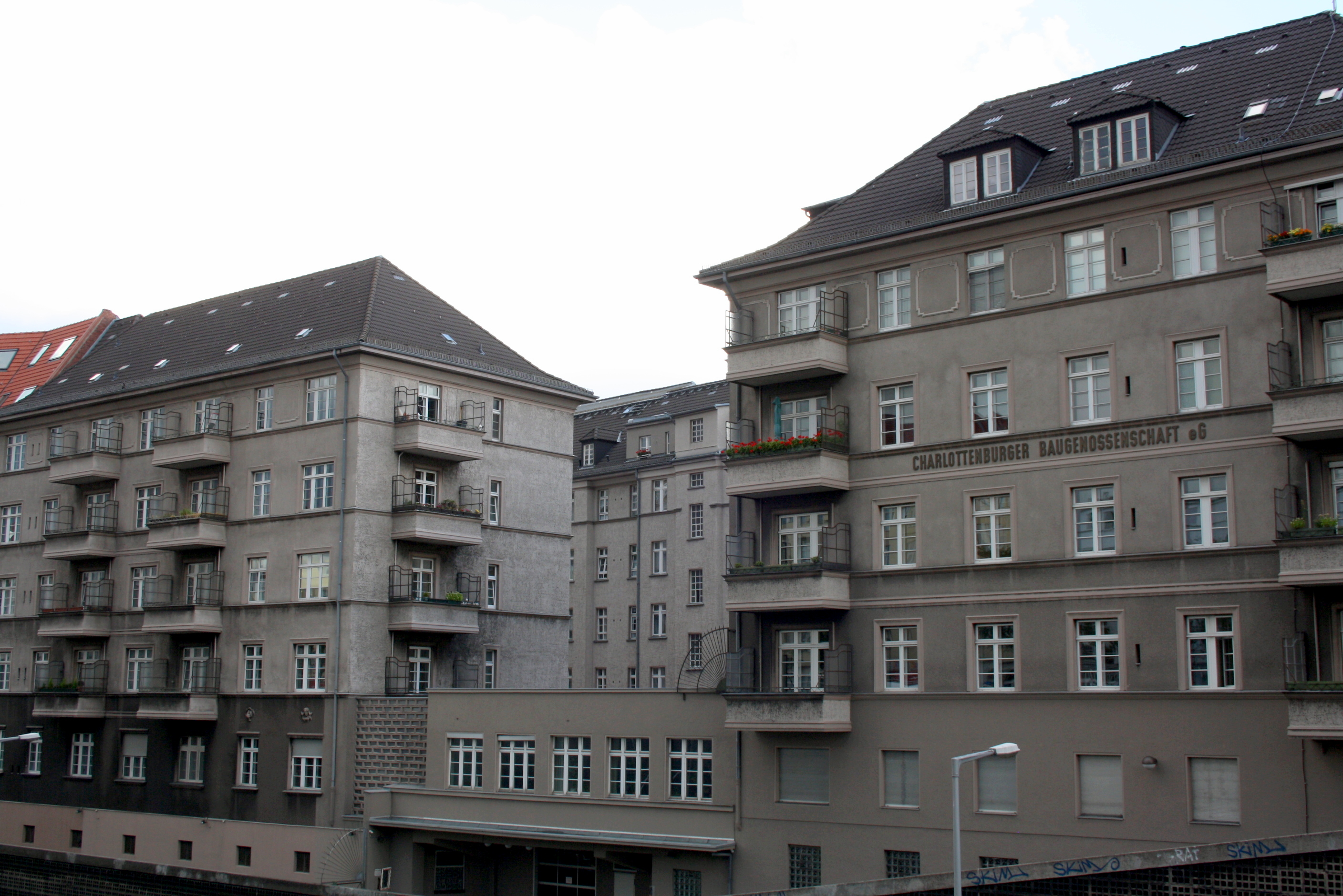 Riehlstr.Wohnanlage